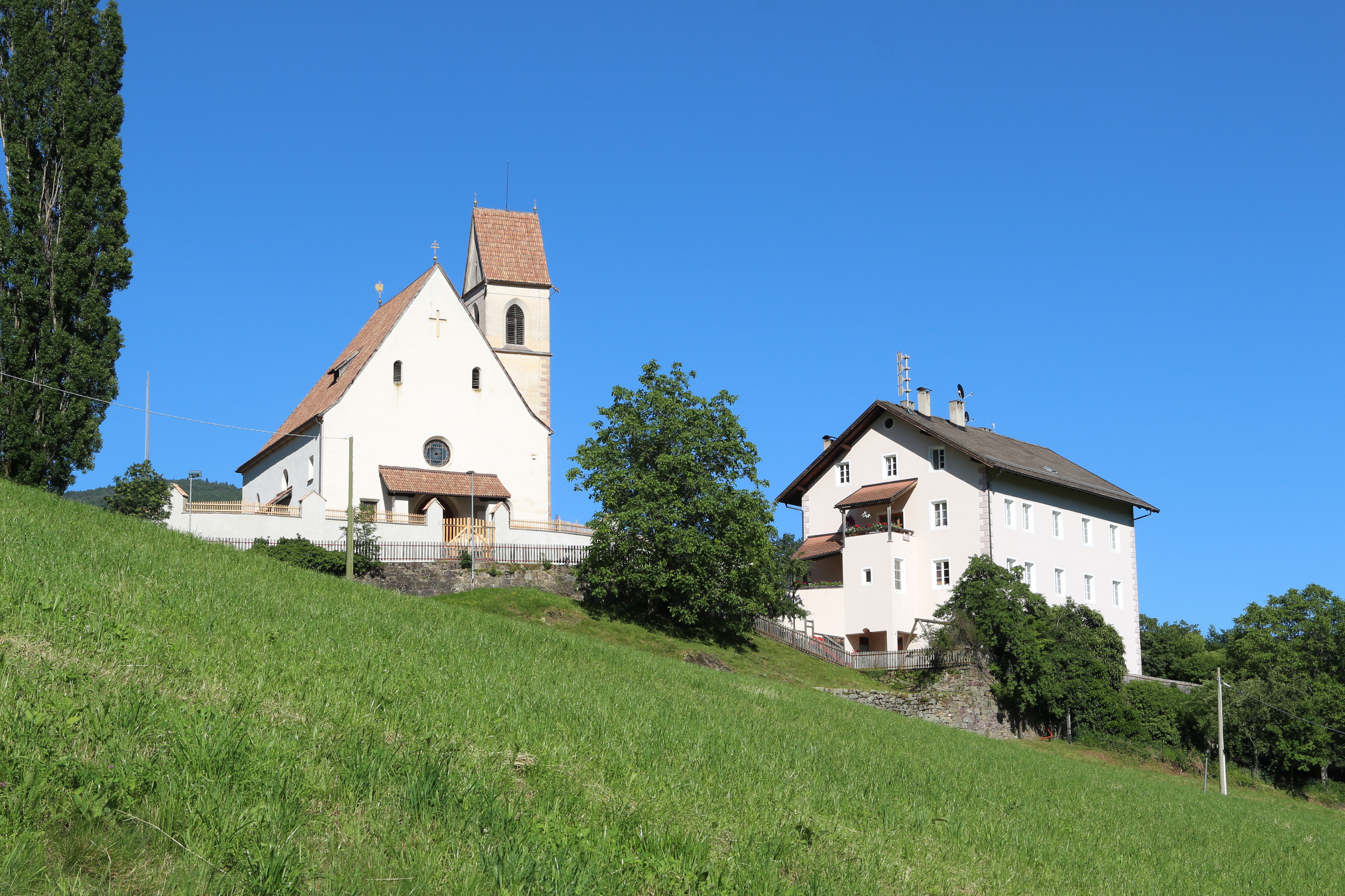 Pfarrkirche St. Nikolaus in Afing, Gemeinde Jenesien, Südtirol.